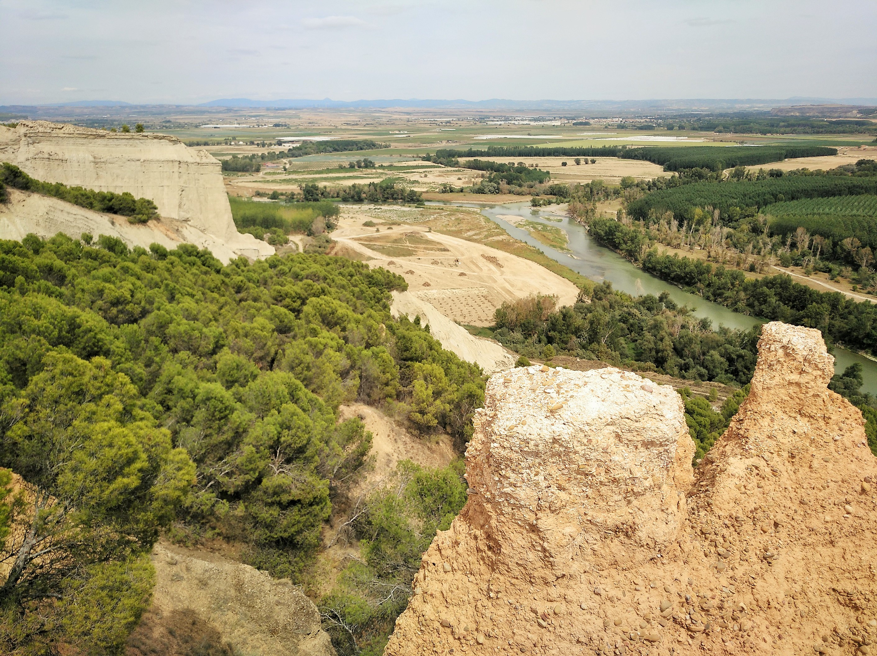 Aragoi eta Arga ibaien elkargunea Peñalenen, Nafarroa